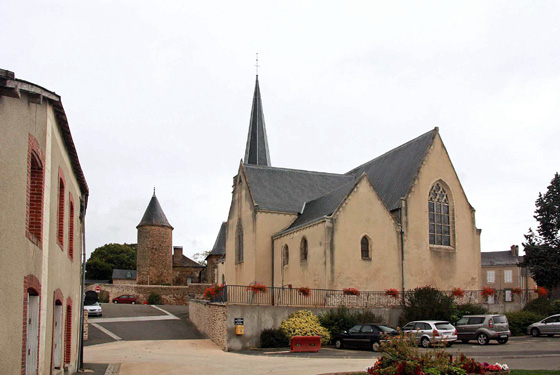 Montigné-le-Brillant (Mayenne) - Eglise St Georges